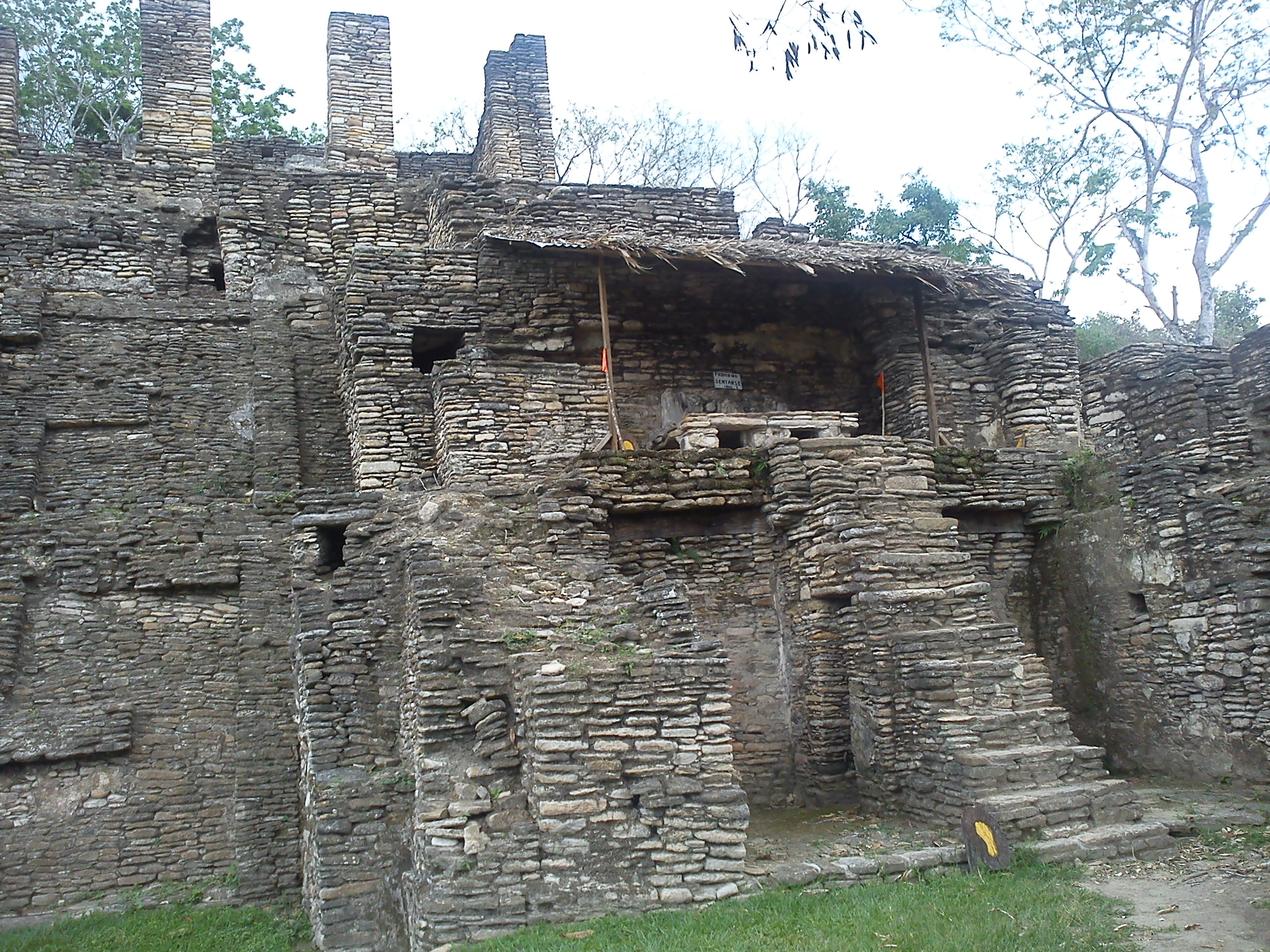 Vista desde el interior de la Pirámide de Toniná